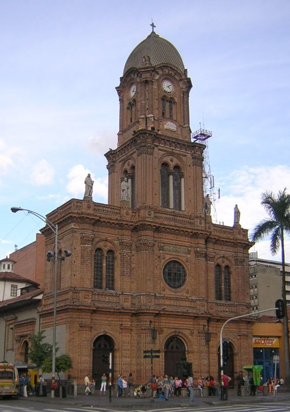 Iglesia de San José (centro). Medellín, Colombia.